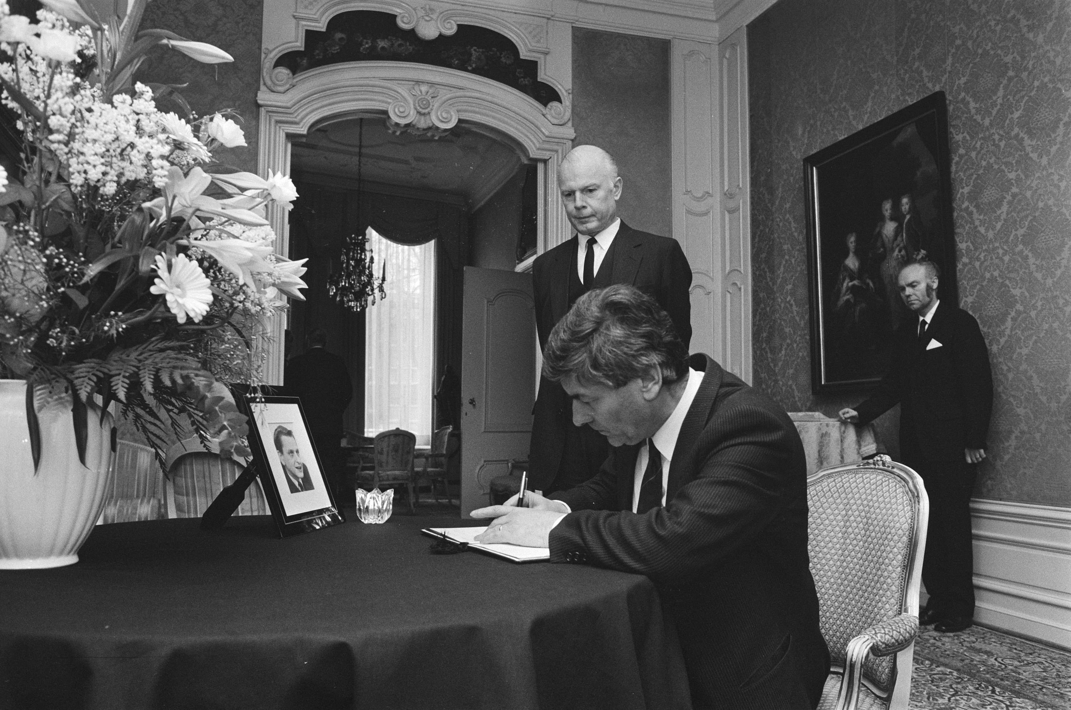 Collectie / Archief : Fotocollectie Anefo Reportage / Serie : [ onbekend ] Beschrijving : Lubbers tekent in Den Haag het condoleanceregister van vermoorde Zweedse premier Olaf Palme. Achter hem de Zweedse ambassadeur Danelius Datum : 4 maart 1986 Locatie : Den Haag, Zuid-Holland Trefwoorden : ambassades, ministers-presidenten, rouw Persoonsnaam : Danelius, H., Lubbers, Ruud, Palme, Olof Fotograaf : Croes, Rob C. / Anefo, [onbekend] Auteursrechthebbende : Nationaal Archief Materiaalsoort : Negatief (zwart/wit) Nummer archiefinventaris : bekijk toegang 2.24.01.05 Bestanddeelnummer : 933-5838